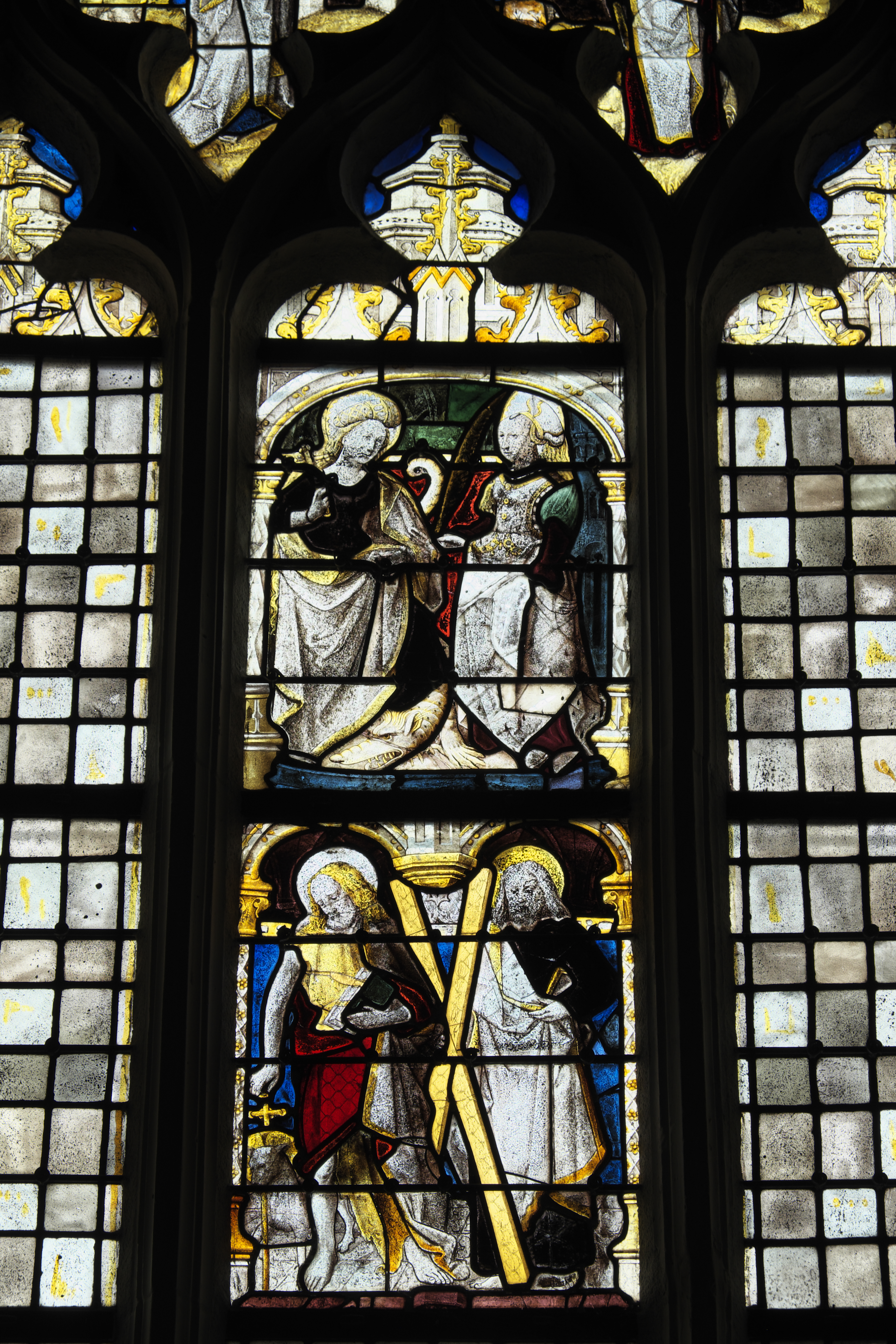 Kirche Sainte-Marie-Madeleine, ehemalige Stiftskirche Notre-Dame, in Champeaux im Département Ille-et-Vilaine (Region Bretagne/Frankreich), Bleiglasfenster (Baie 3) um 1500; Darstellung: Heilige Margareta und heilige Barbara (oben), Johannes der Täufer und Apostel Andreas (unten)